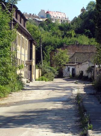 Вулиця Петрівська, Київ